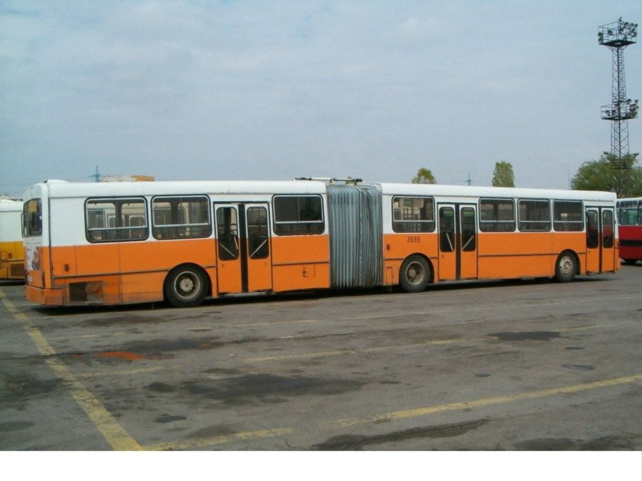 Mercedes O305 G Heuliez